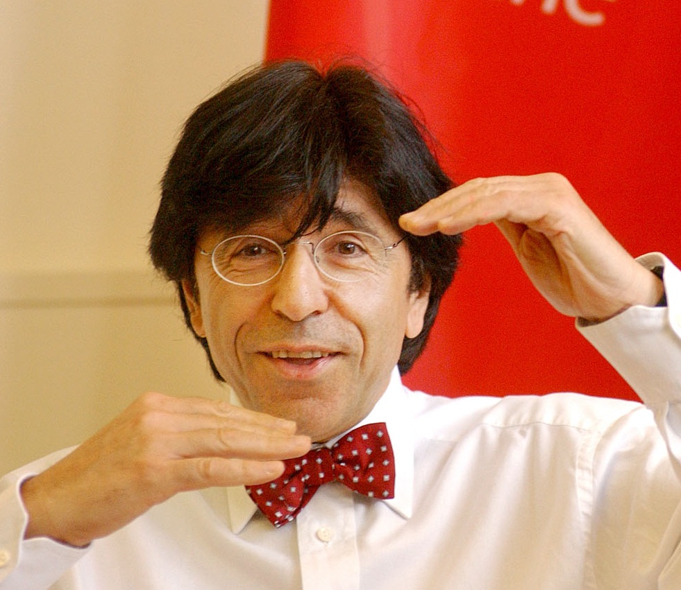 Elio Di Rupo, Waals-Belgische scheikundige en politicus, Parti Socialiste (PS)